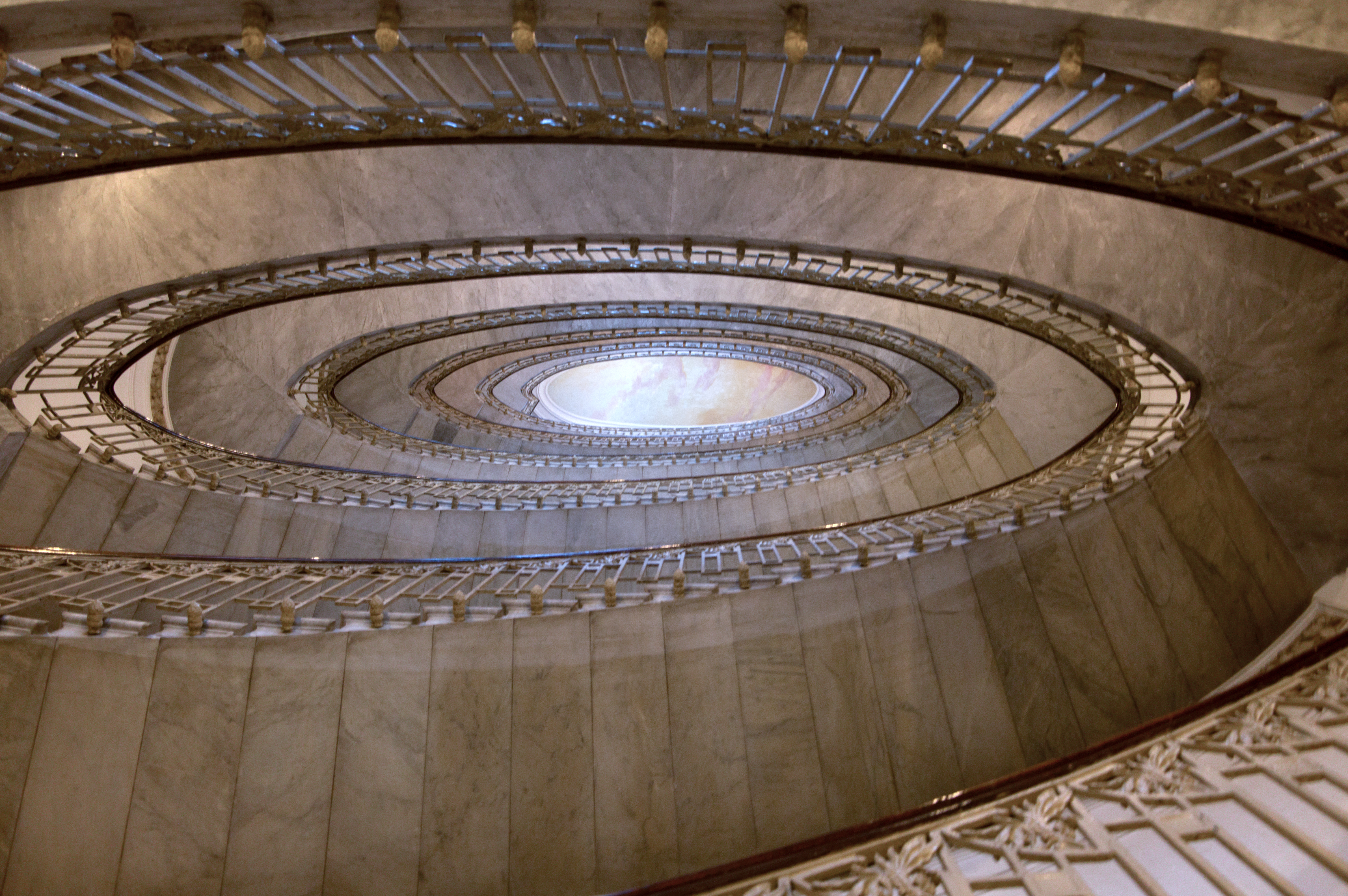 Scala elicoidale di Palazzo Mannaiuolo